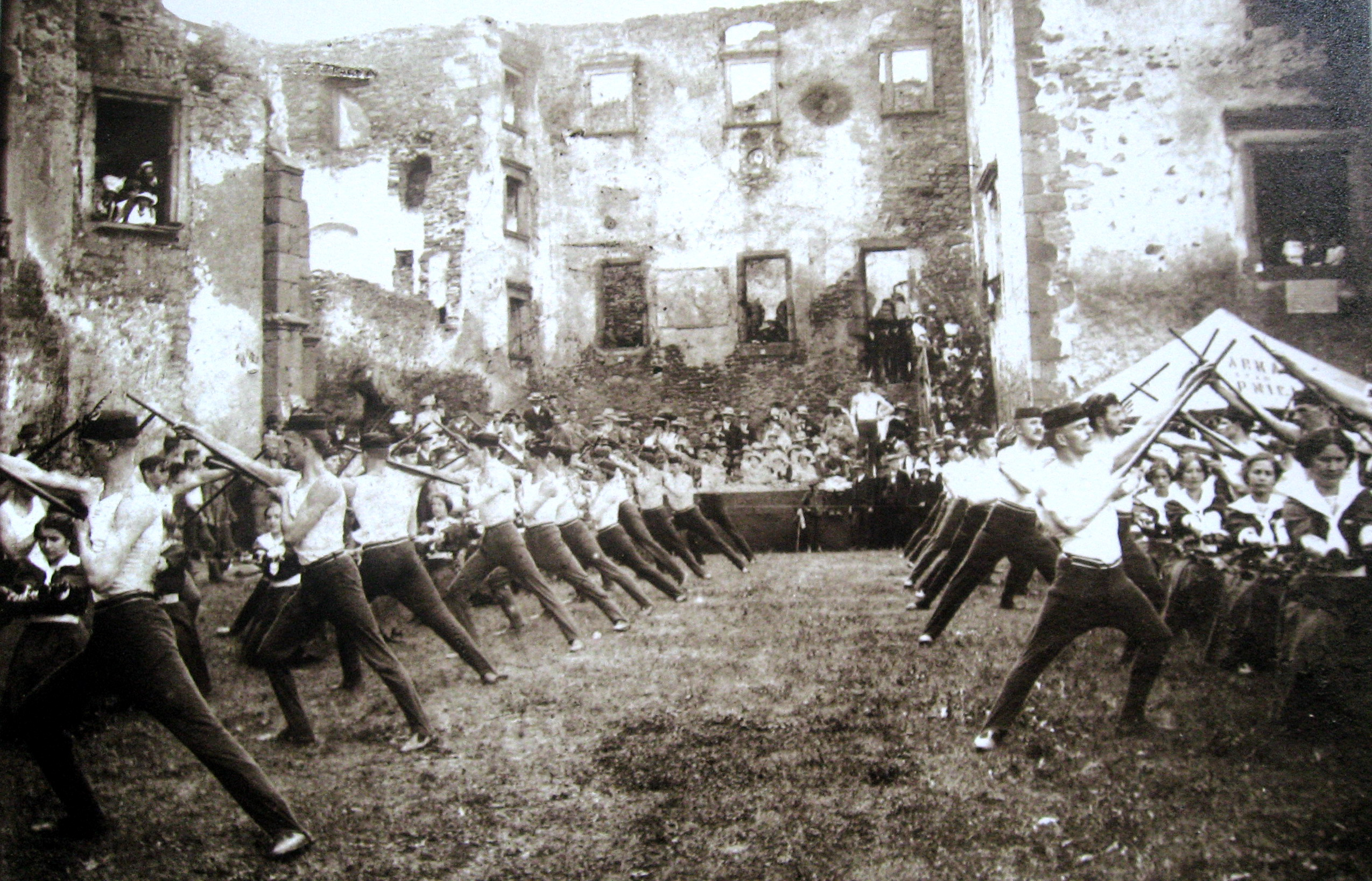 Cvičení Sokola na hradním nádvoří hradu/zříceniny Lipnice nad Sázavou před rokem 1913